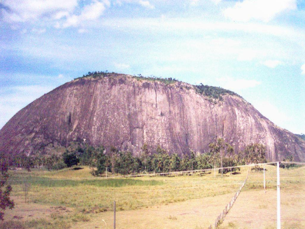 Pedra da LOrena. Aimorés Minas Gerais, Brasil.